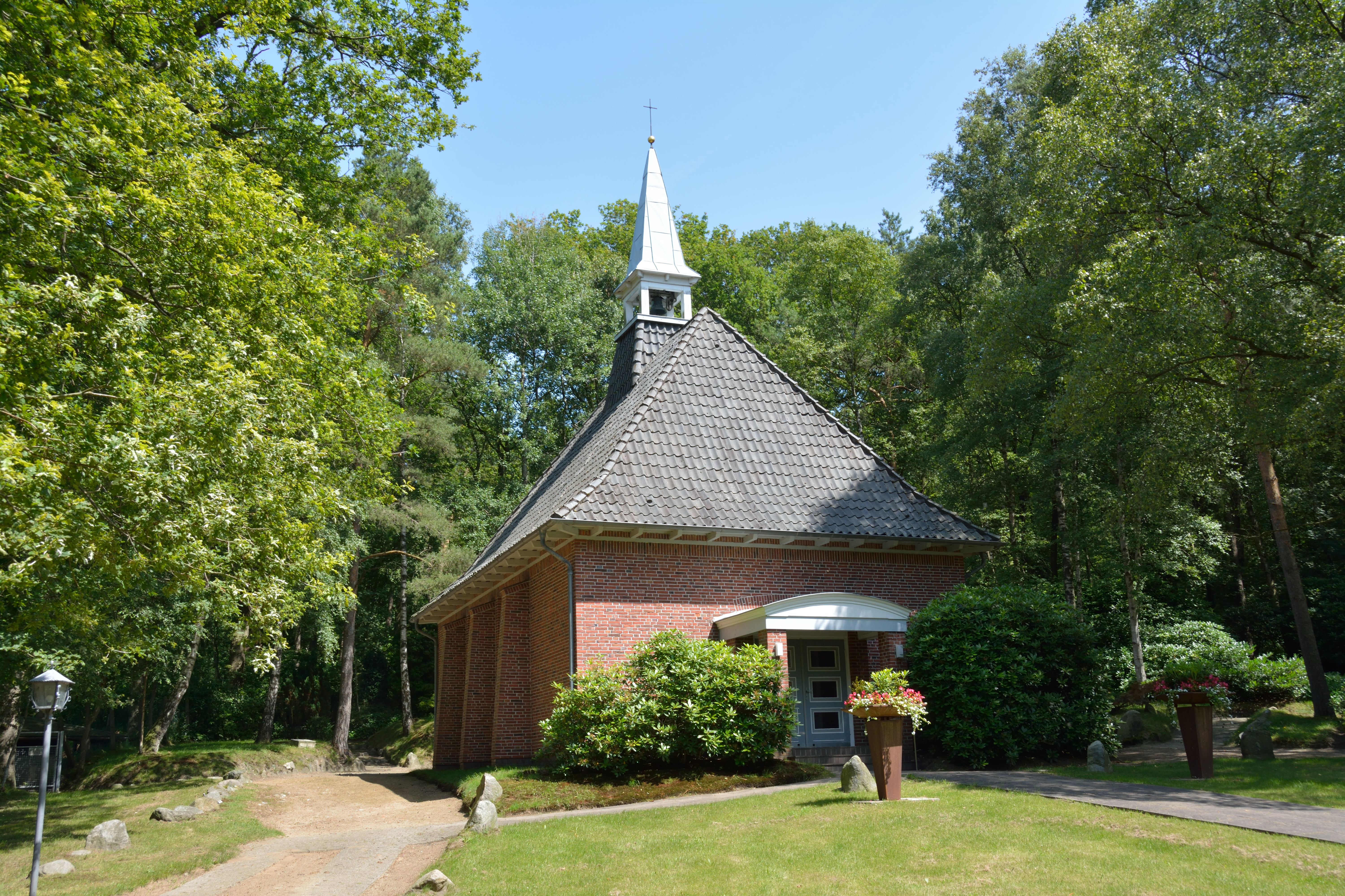 Mehlbek, Friedhofskapelle